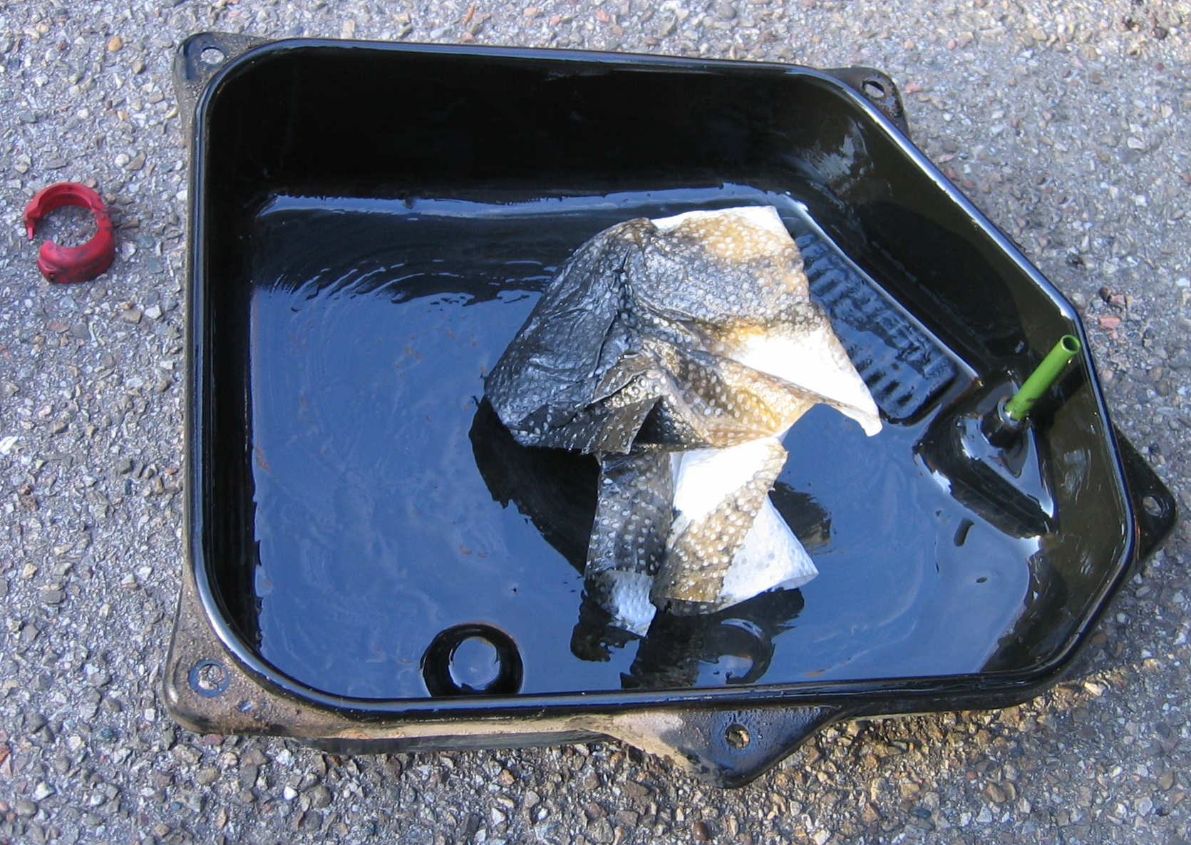 Ölwanne Automatikgetiebe mit abgelagertem Ölschlamm